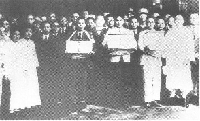 3의사 (이봉창, 윤봉길, 백정기)의 유해 서울역